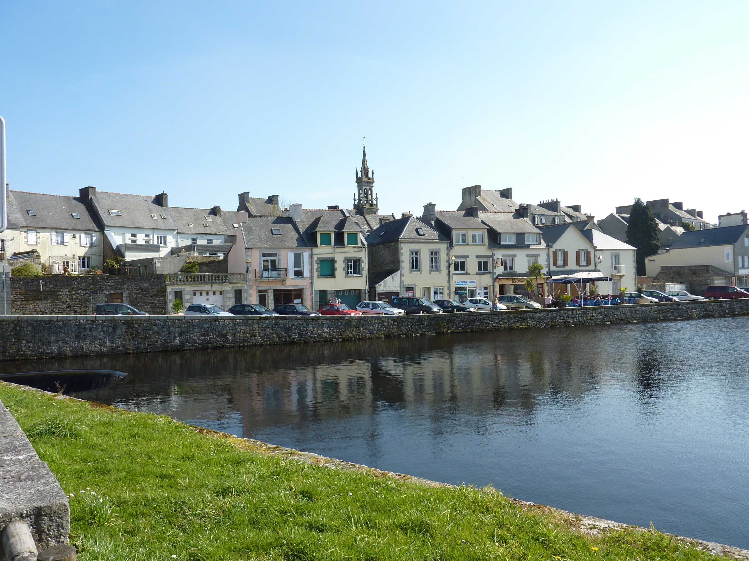 La ville vue depuis le lac